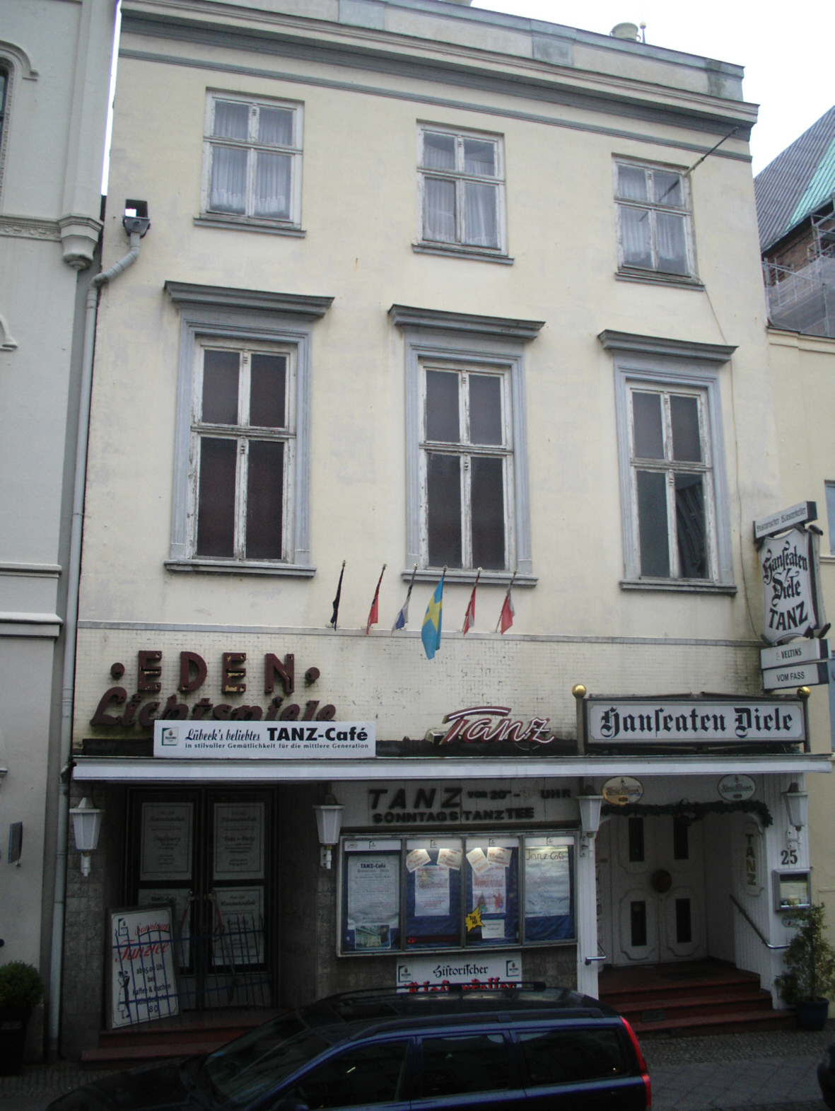 Das ehemalige Kino Eden in der Königstraße 25 in Lübeck.